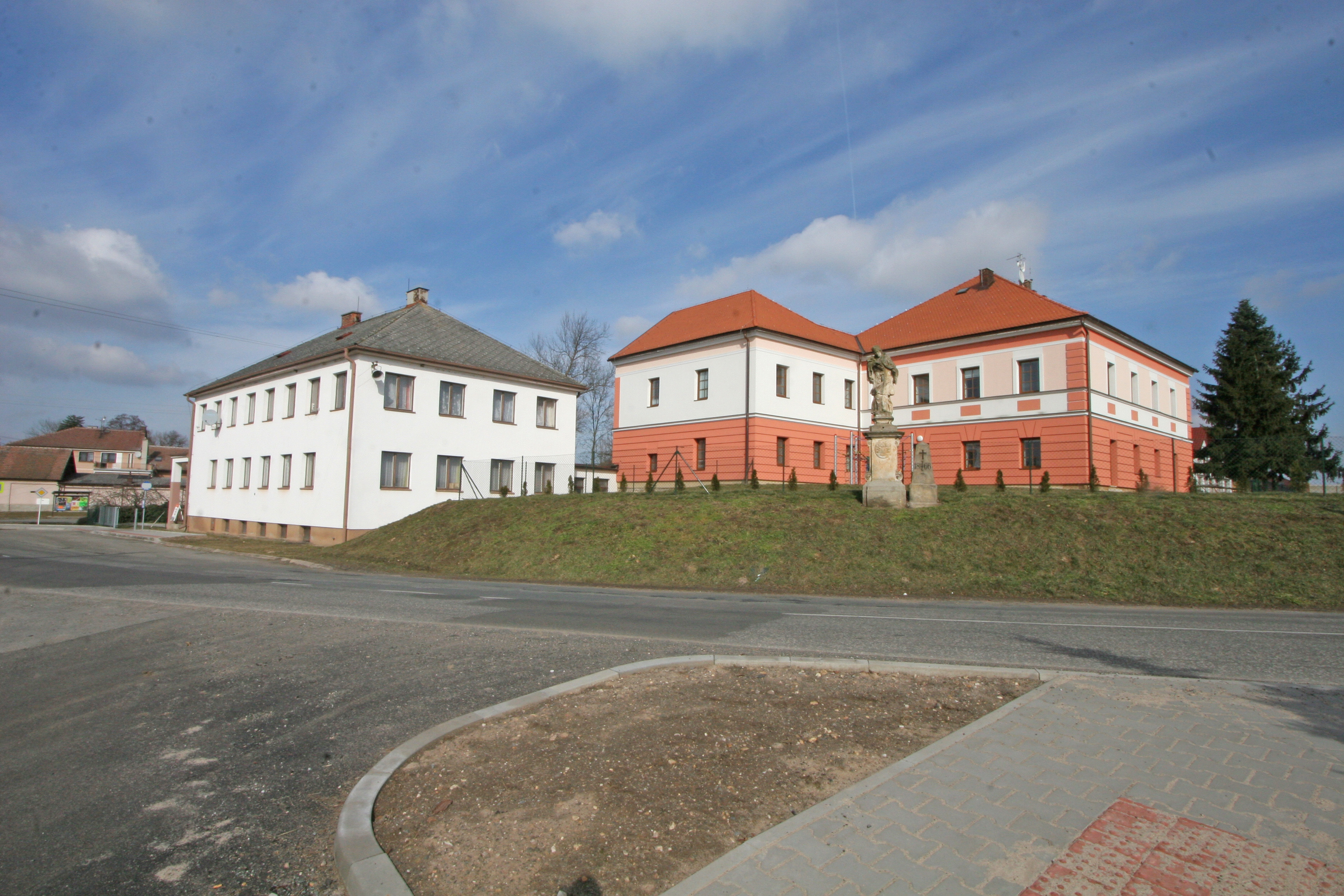 Česky: Kunčice obecní úřad